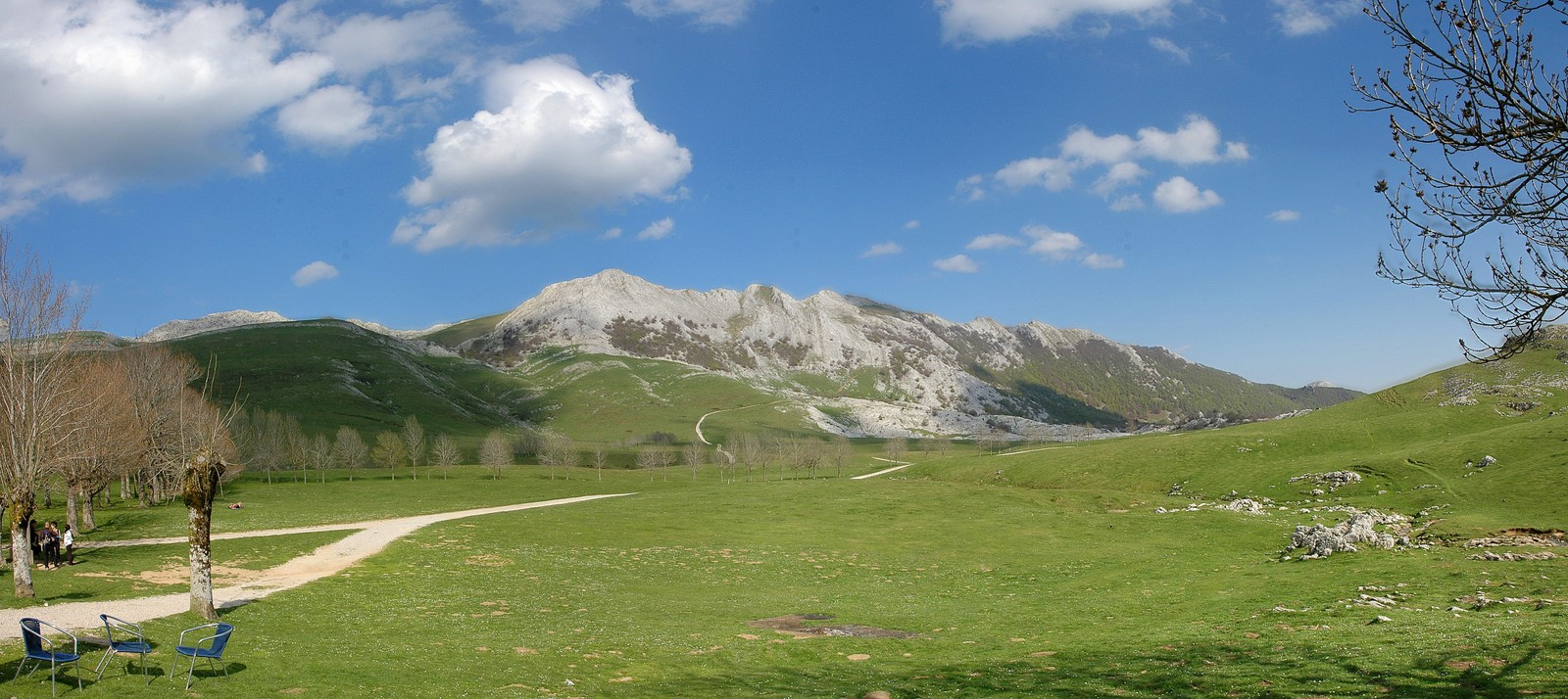 Urbia (Gipuzkoa)